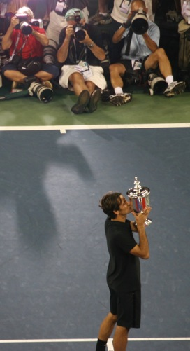 Roger Federer - 2007 US Open Champion